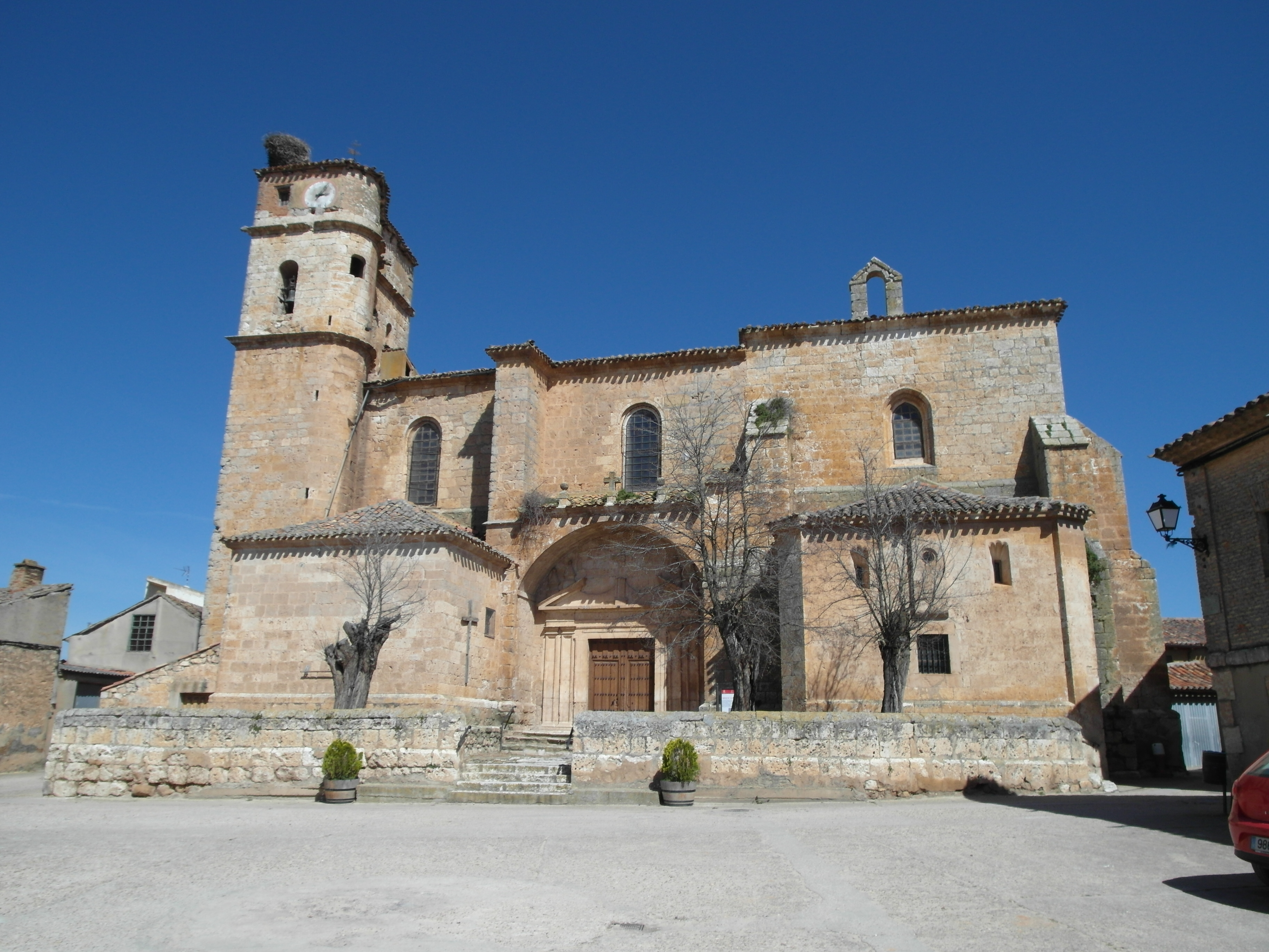 Quintana del Pidio, Burgos.